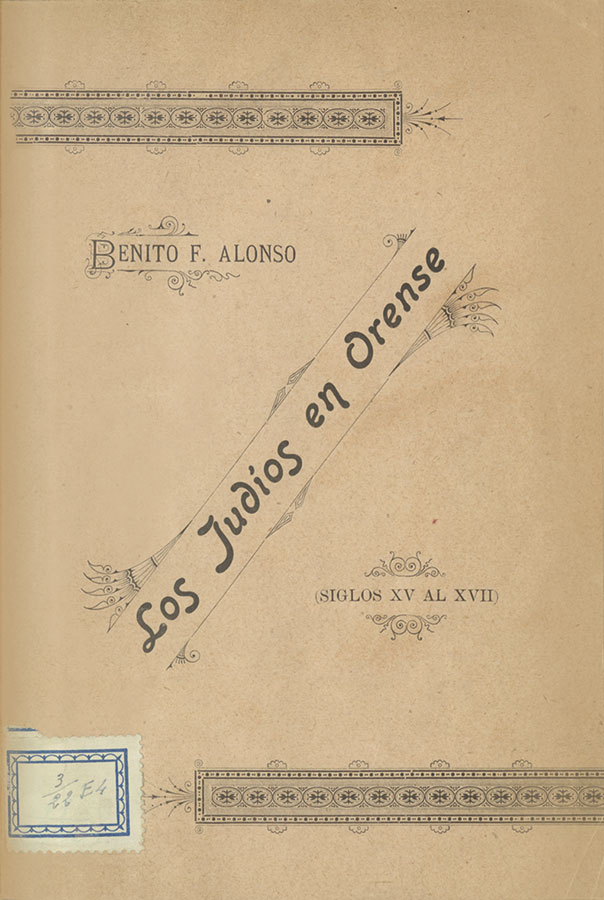 Los judíos en Orense, siglos XV al XVII